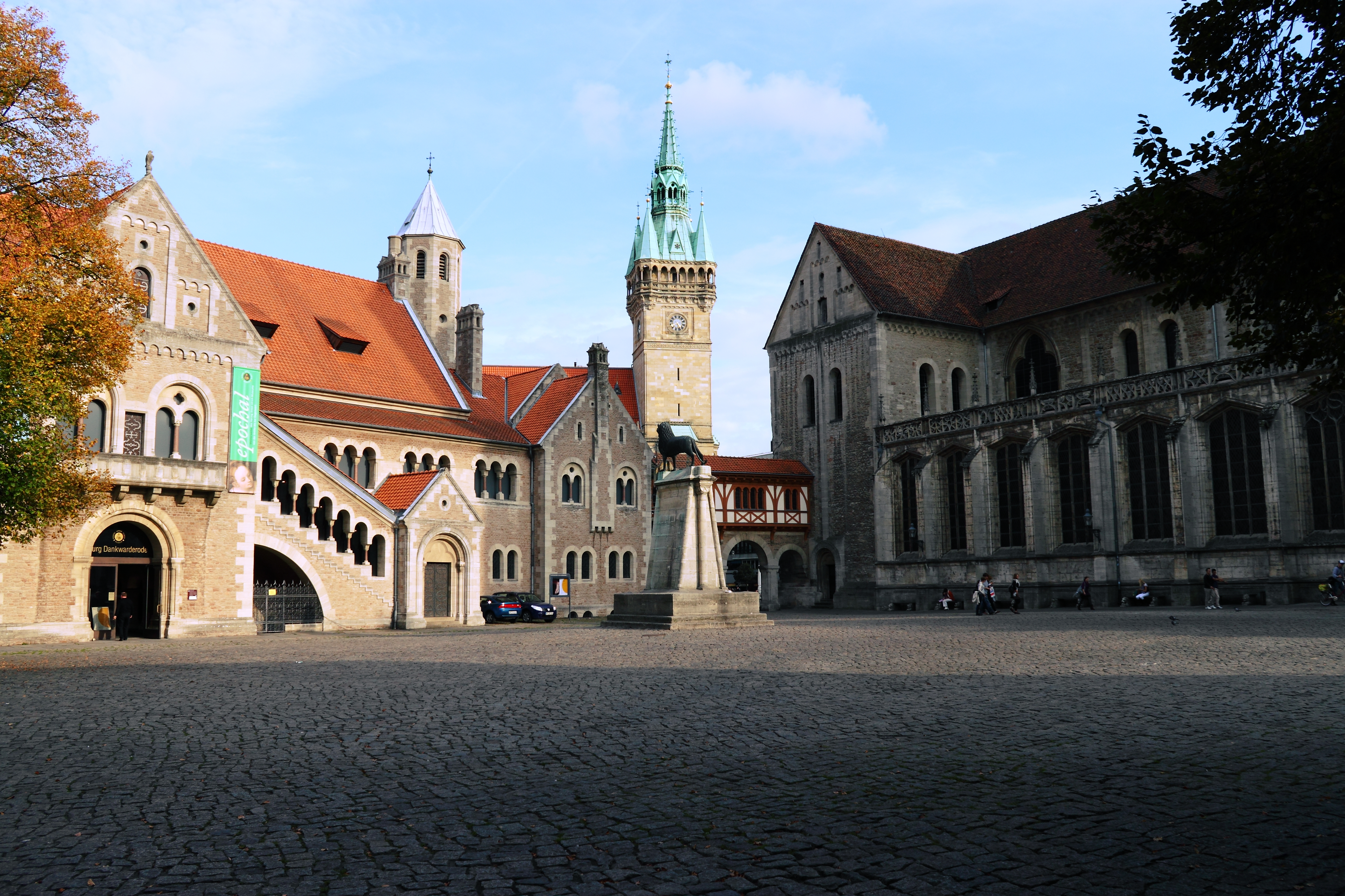 Braunschweig 38100 Burgplatz: Diese Aufnahme zeigt den Burgplatz in Braunschweig zur Mittagszeit. Links ist ein Teil der Burg Dankwarderode, in der Mitte im Vordergrund der Braunschweiger Löwe, in der Mitte im Hintergrund der Turm des Braunschweiger Rathauses und Rechts der Mittelbau des Braunschweiger Doms zu sehen.